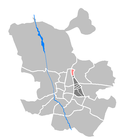 Costillares within Ciudad Lineal (Madrid). Costillares dentro de Ciudad Lineal (Madrid).